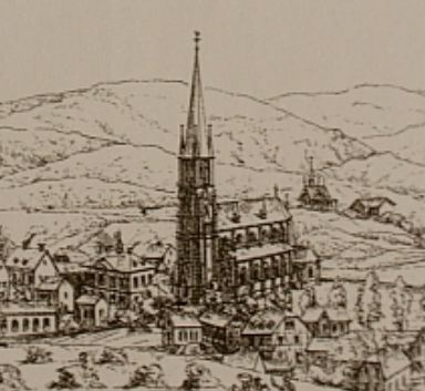 Die katholische Kirche Sankt Remigius in Sonnborn auf einer Zeichnung von 1879